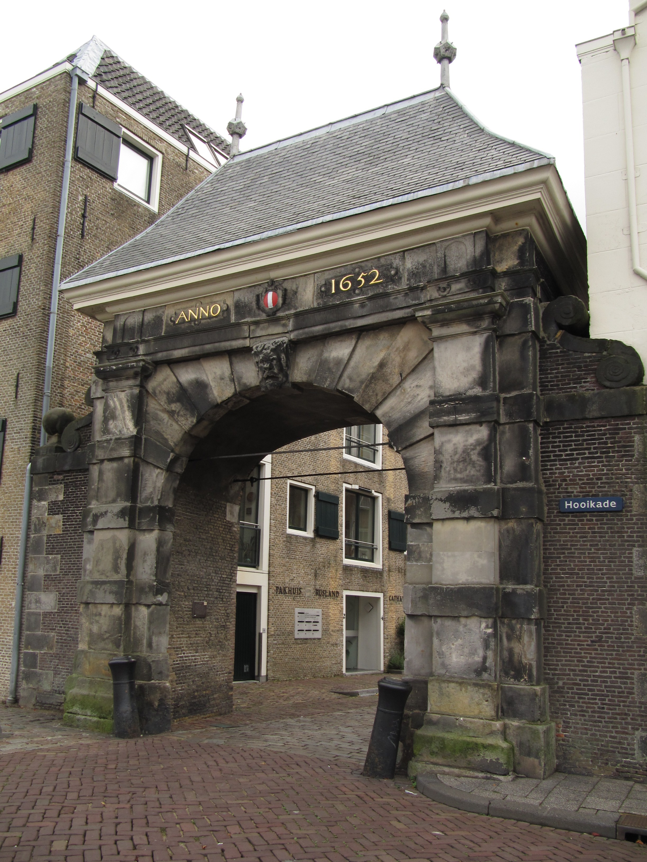 RM13489 Dordrecht - Catharijnepoort.jpg